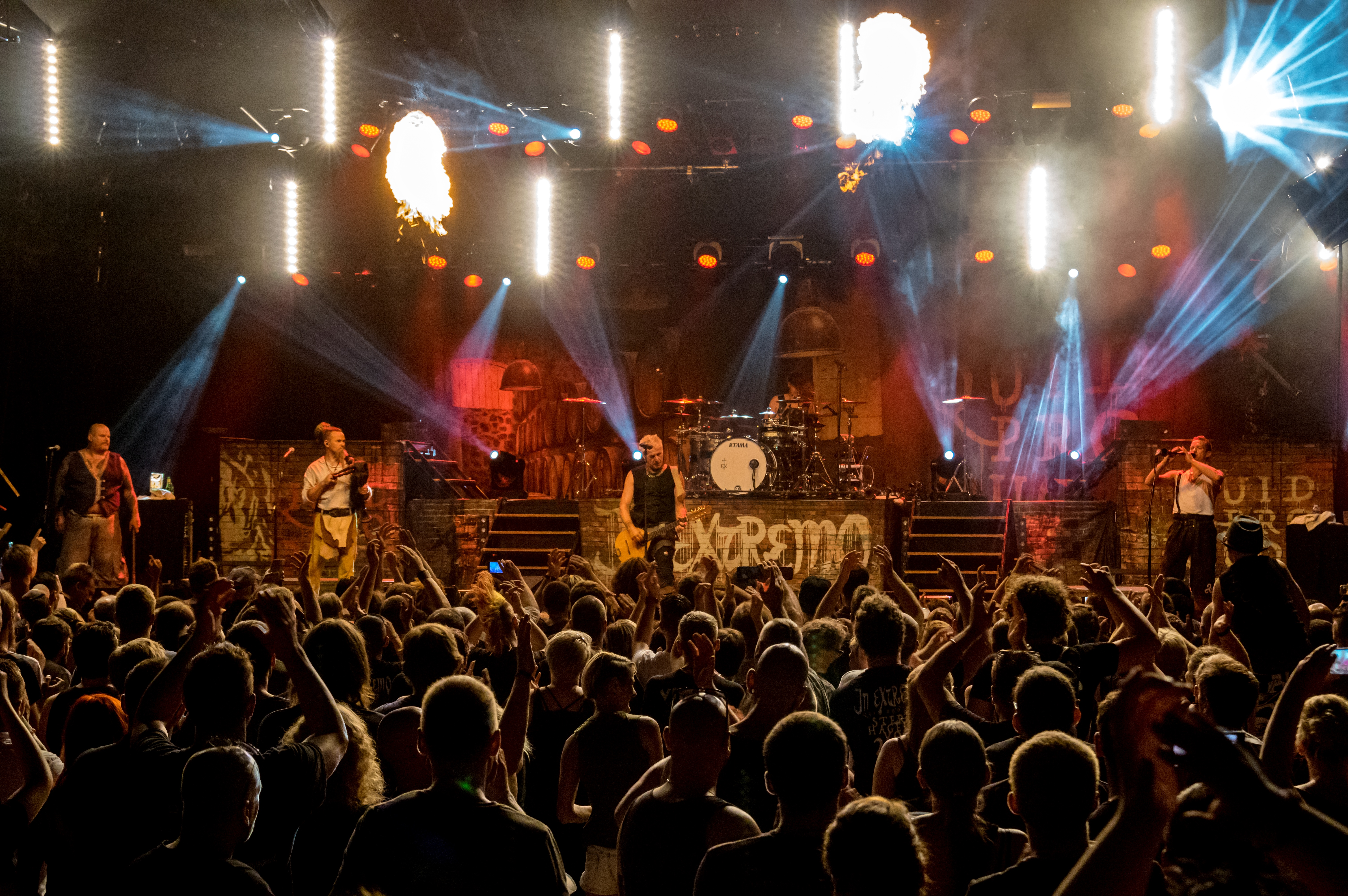 Bilder vom Zelt Musik Festival 2018 in Freiburg im Breisgau In Extremo am 29.07.2018 im Zirkuszelt